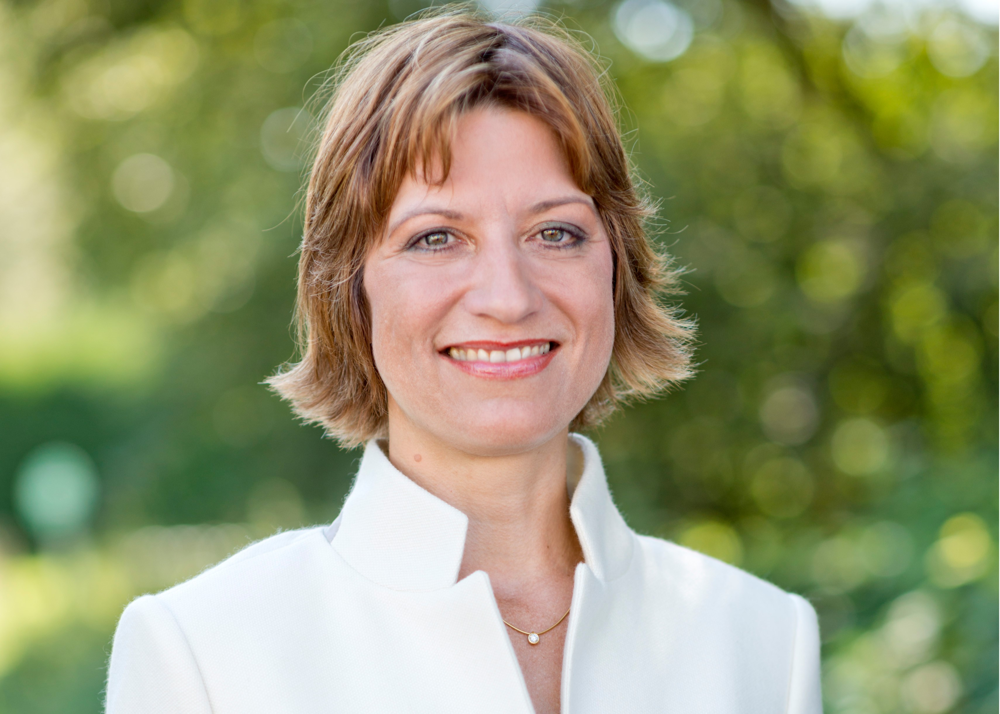 Portrait Iris Gräßler